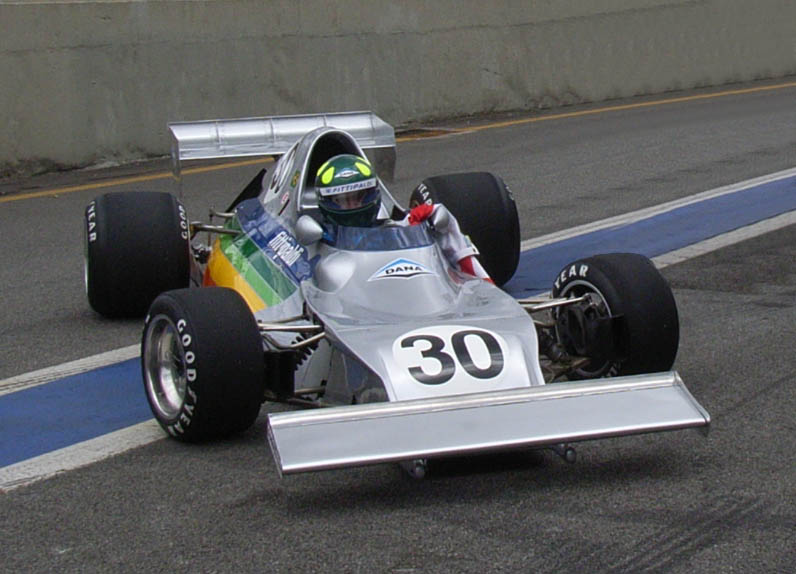 Fittipaldi FD-01 (restored) with Wilson Fittipaldi in 2007